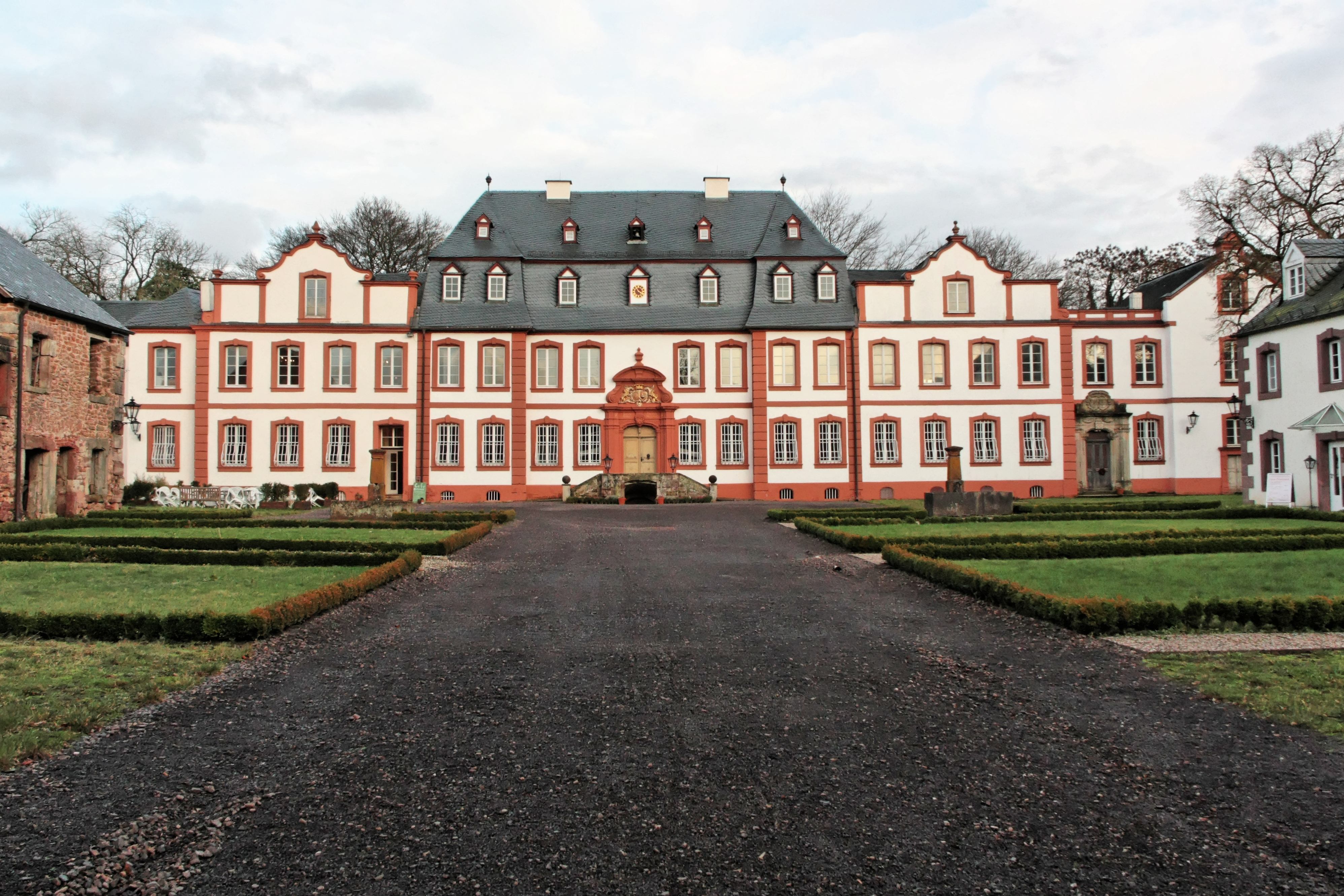 Schloß Münchweiler in Nunkirchen, Landkreis Merzig-Wadern